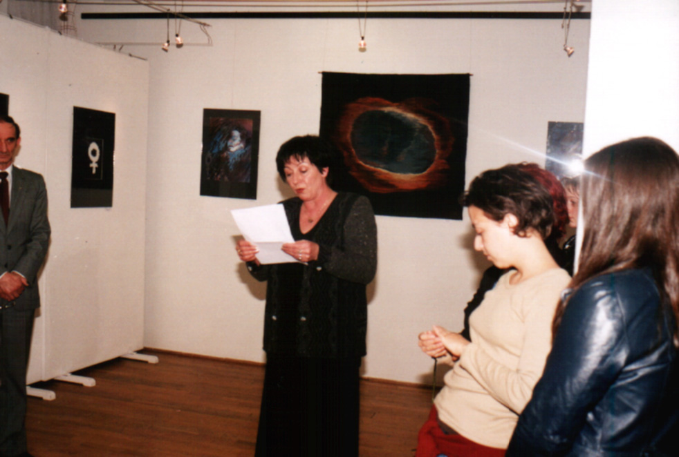 Hamza Studio-A nő, Jászberény